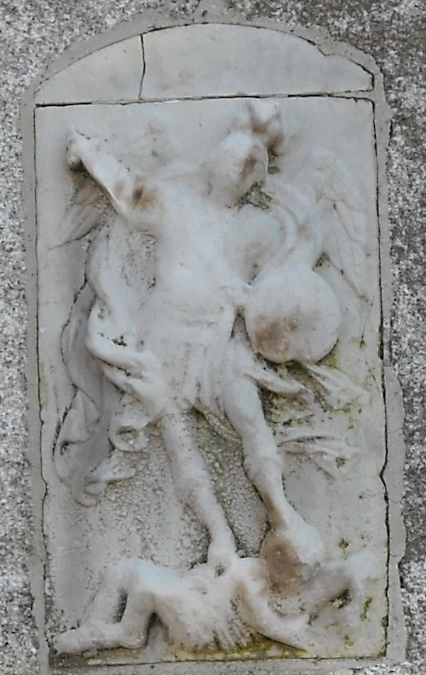 Detalhe do Chafariz de São Miguel, localizado ao lado da Sé do Porto.